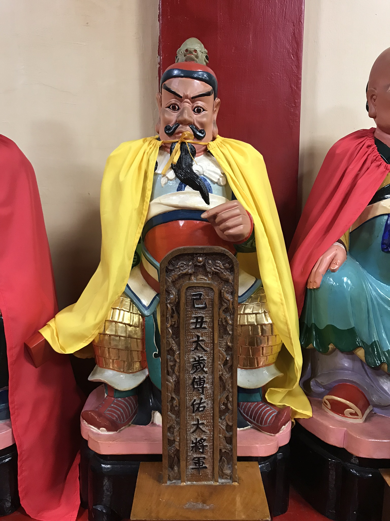 己丑太歲傅佑大將軍神像